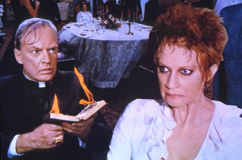 Una scena del film L'anticristo